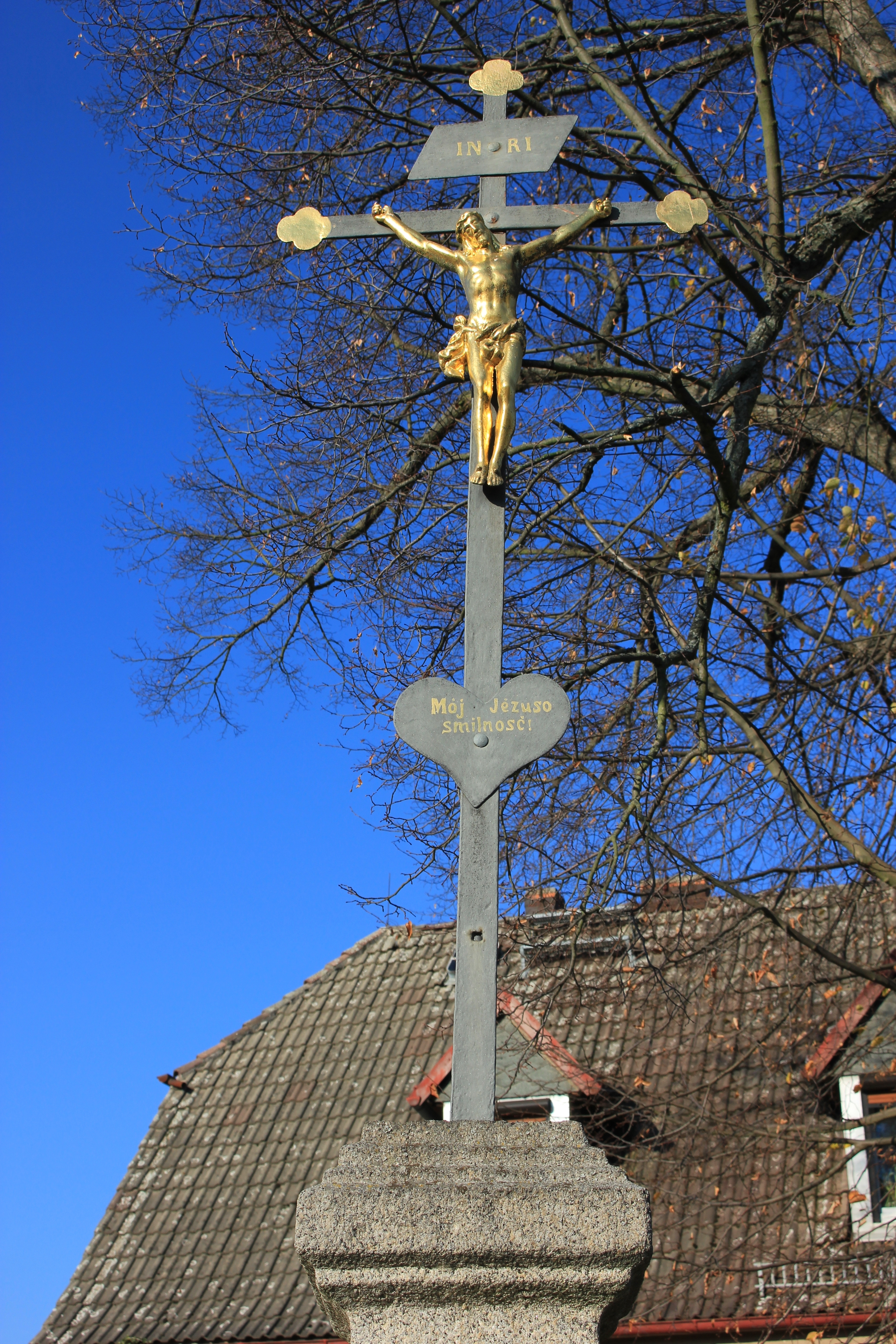 Hornjoserbsce: Swjaty křiž při Zejlerjowej w Brěmjenju.